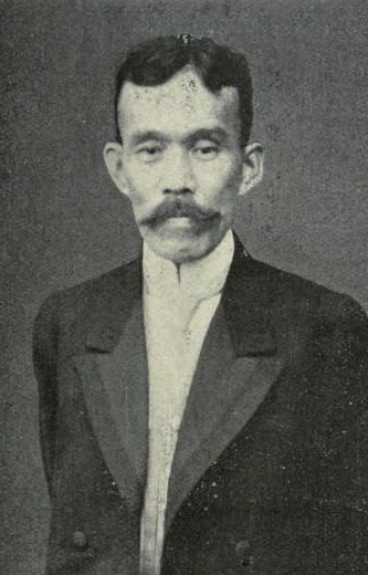 昌谷彰 さかやあきら